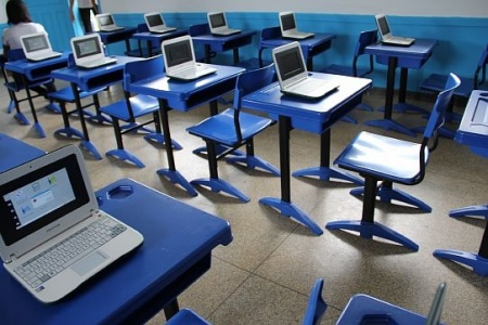 Forma telemática de llevar a cabo la interacción social.